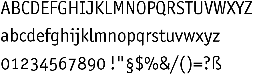 Schriftartenmuster der Officina sans